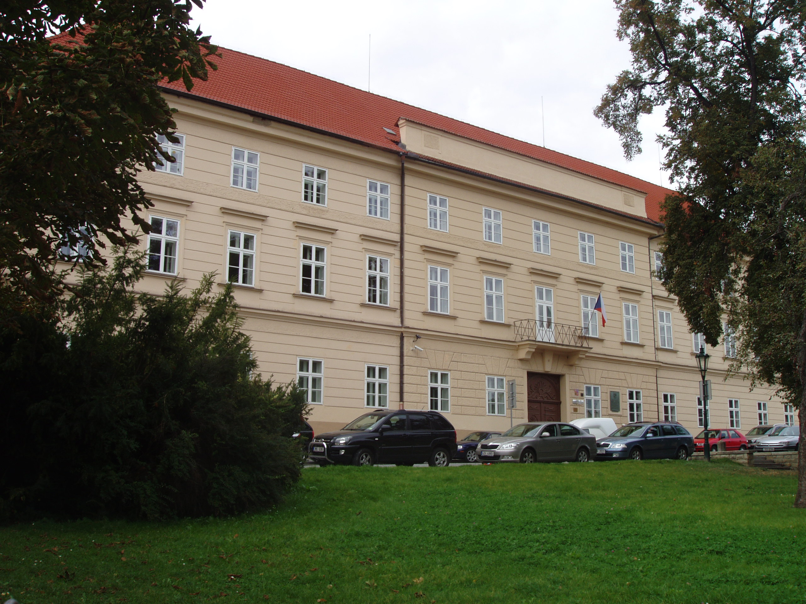 Soud (Kutná Hora), nám. Národního odboje 58/6, Kutná Hora